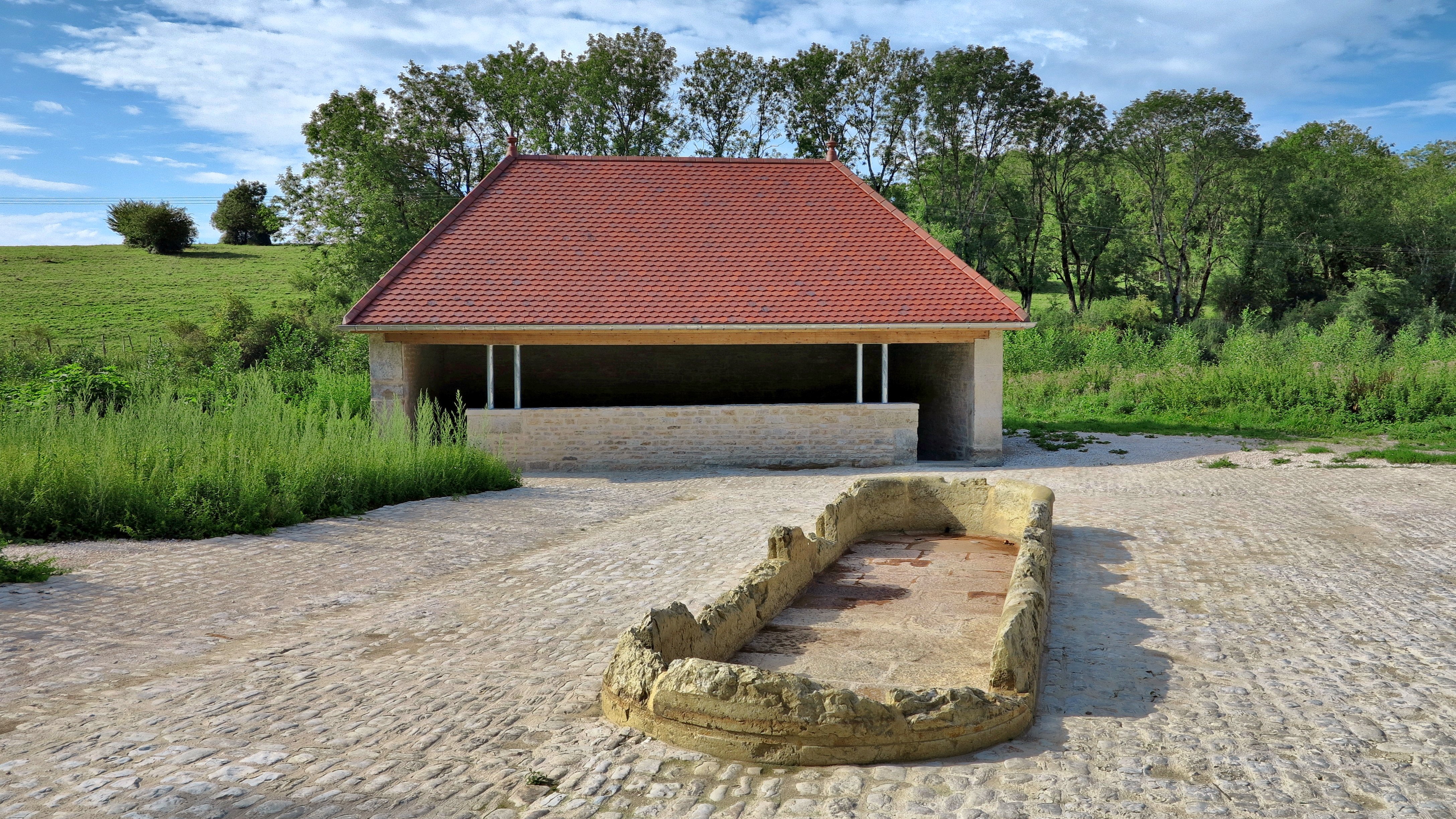 L'abreuvoir et le lavoir du village